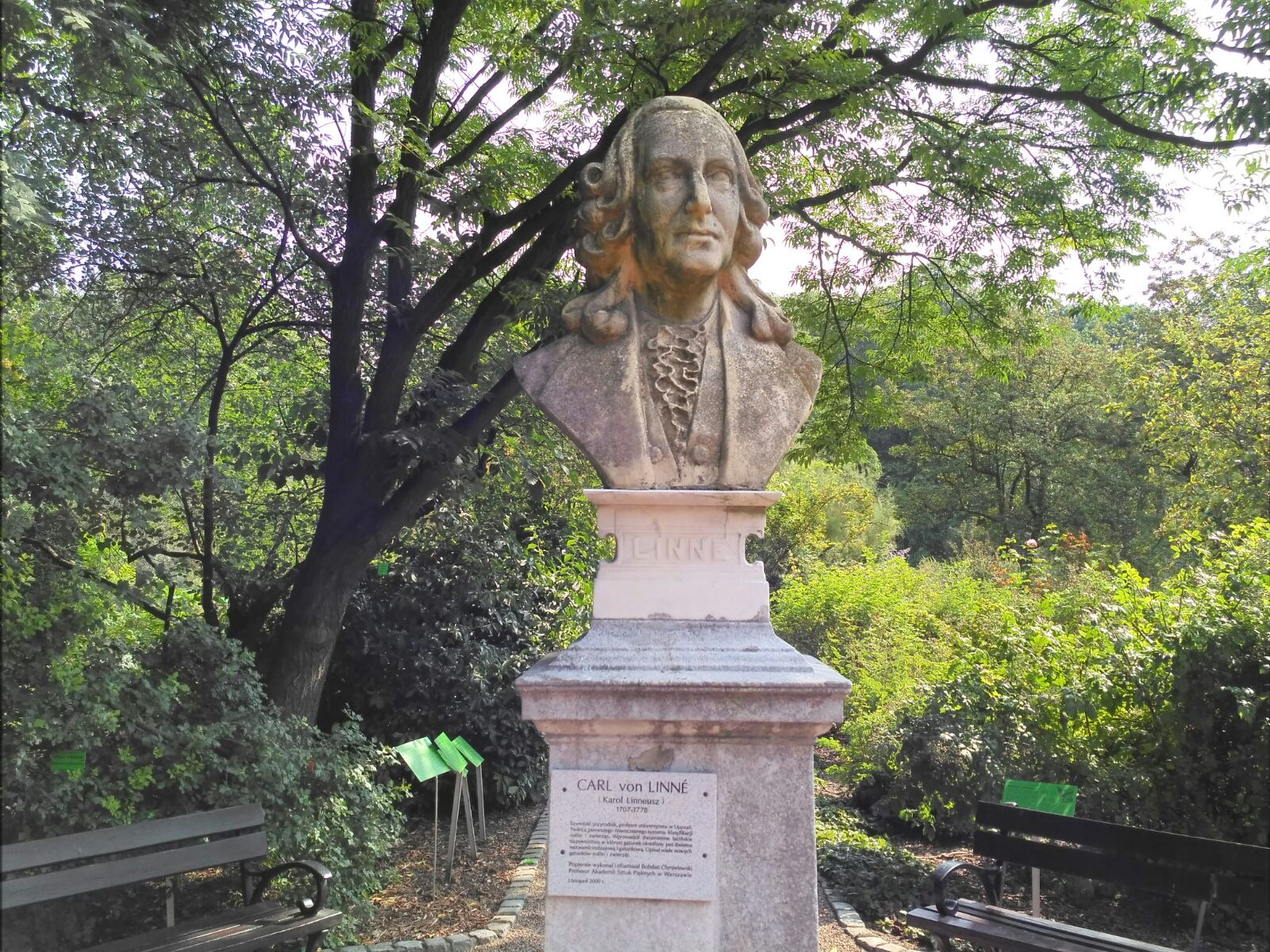 Wrocław, ogród botaniczny - popiersie Karola Linneusza